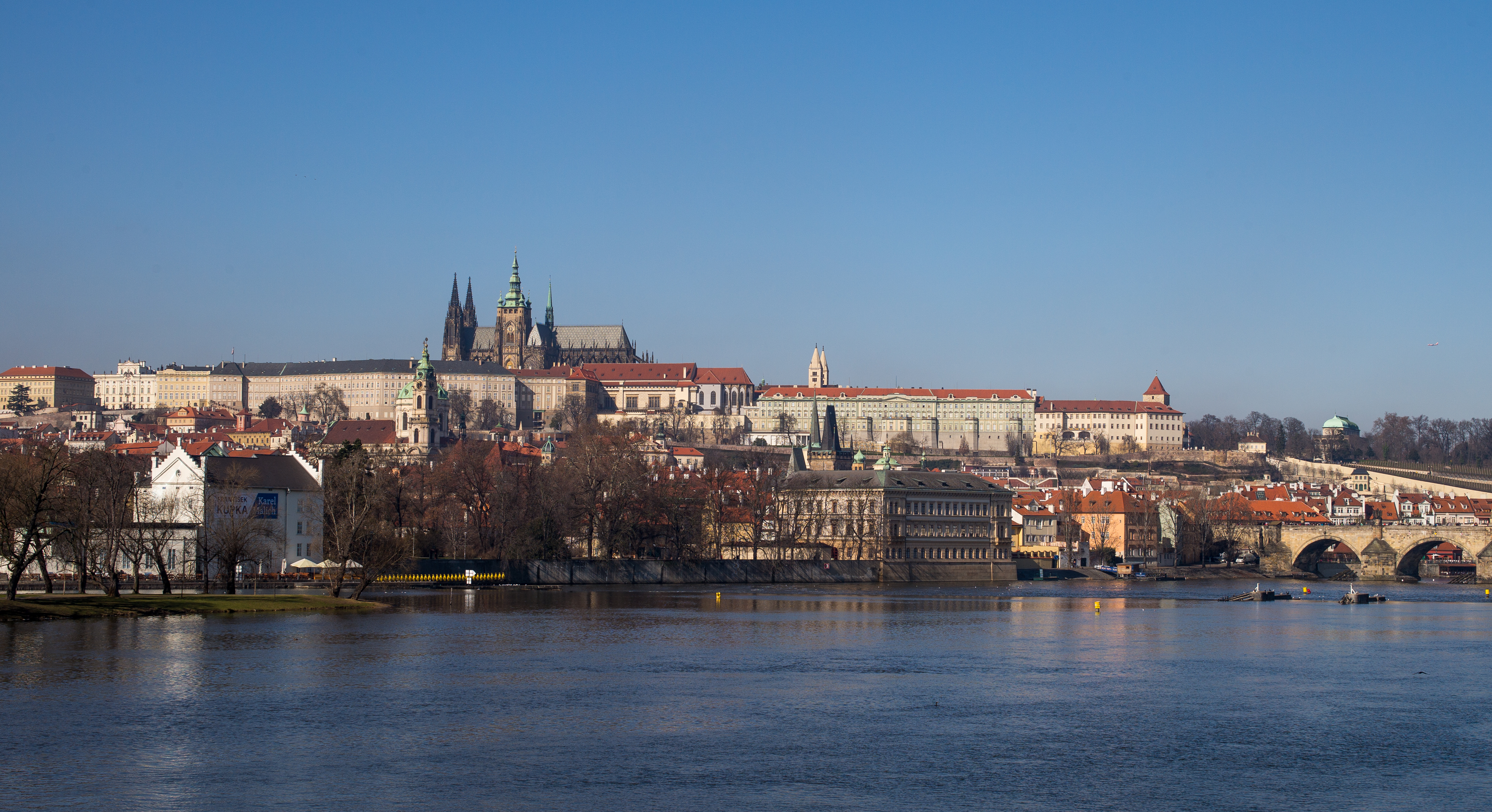 Praha